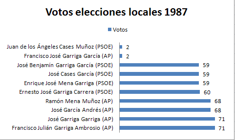 Votos por candidato en las elecciones locales de 1987